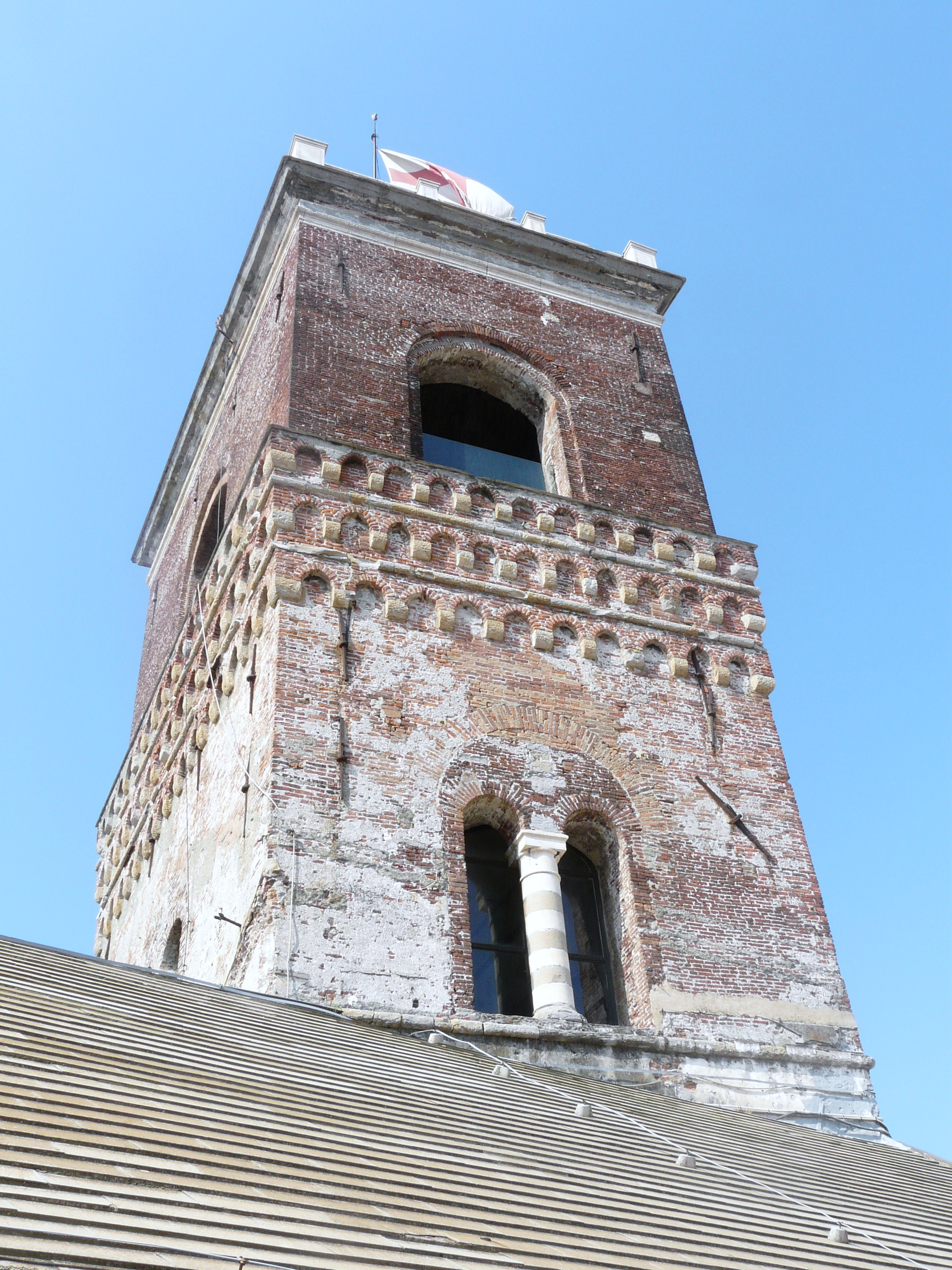 Torre Grimaldina di Palazzo Ducale, Genova, Liguria, Italia